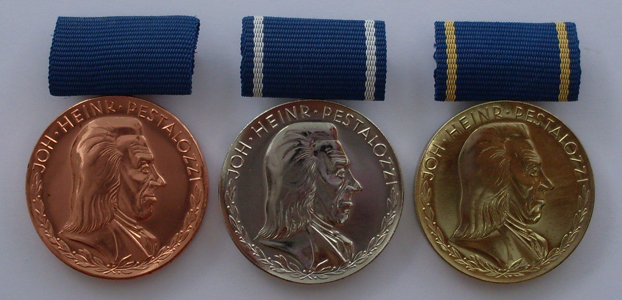 Pestalozzi Medaillen (vorn)